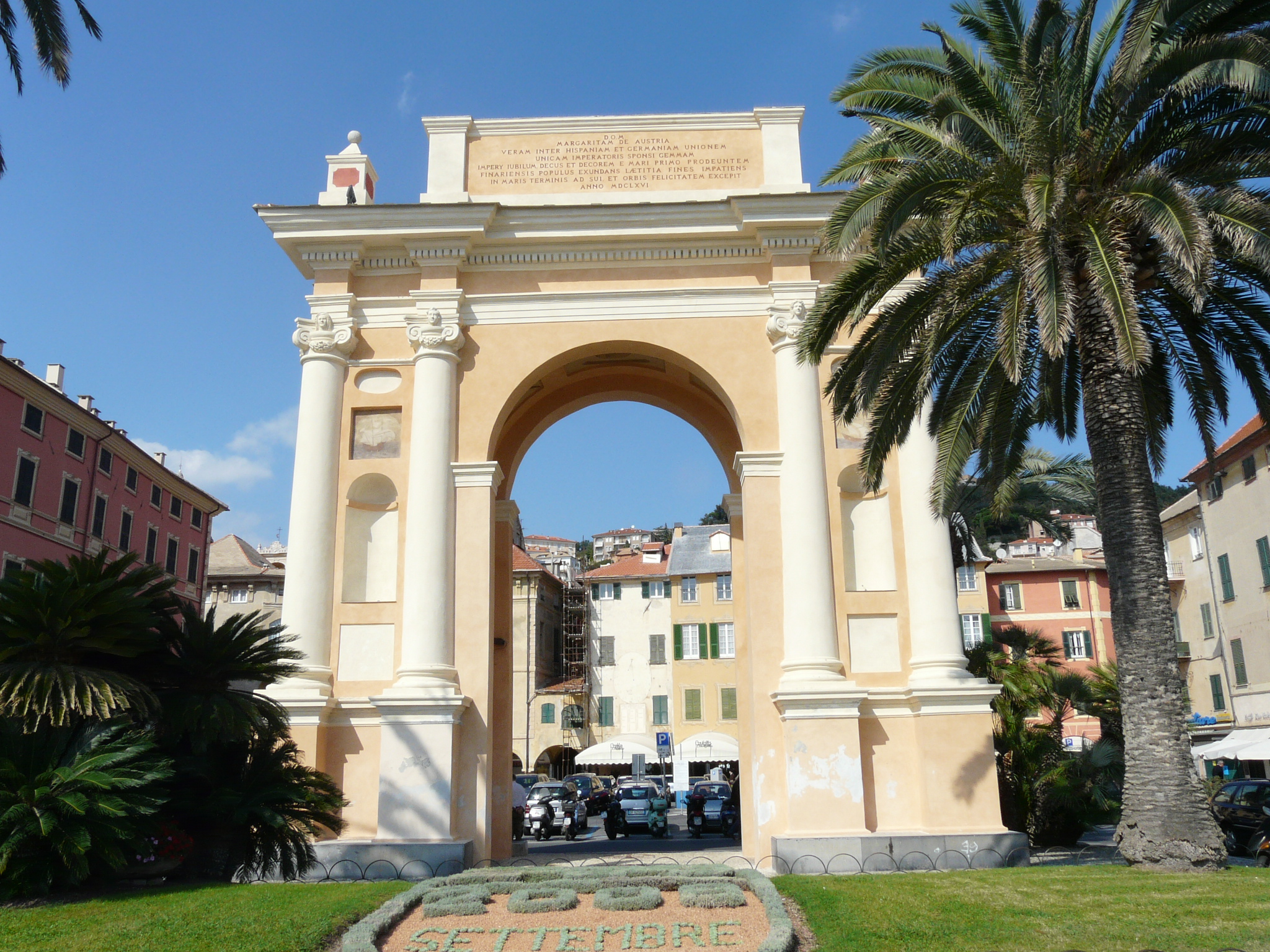 Arco alla duchessa Margherita d'Austria presso Finale Ligure, Liguria, Italia